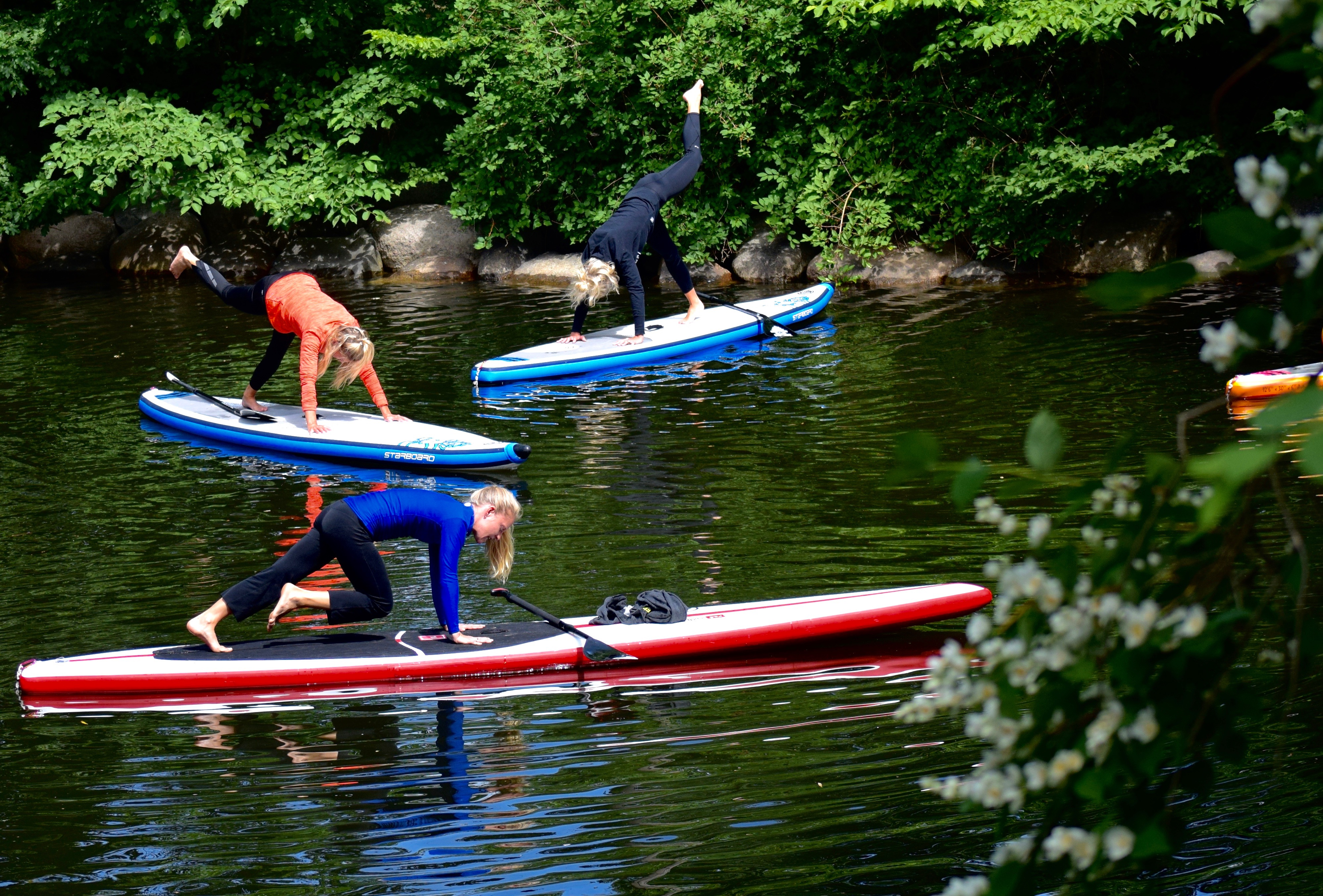 malmö sweden park yoga kayak kungsparken